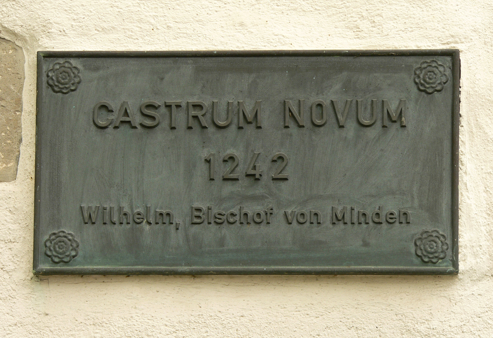 Gedenkplatte an Schloss Bokeloh